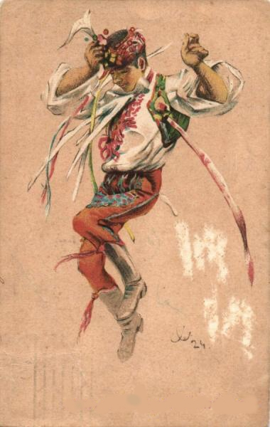 Obrázky Jožy Uprky na pohlednicích